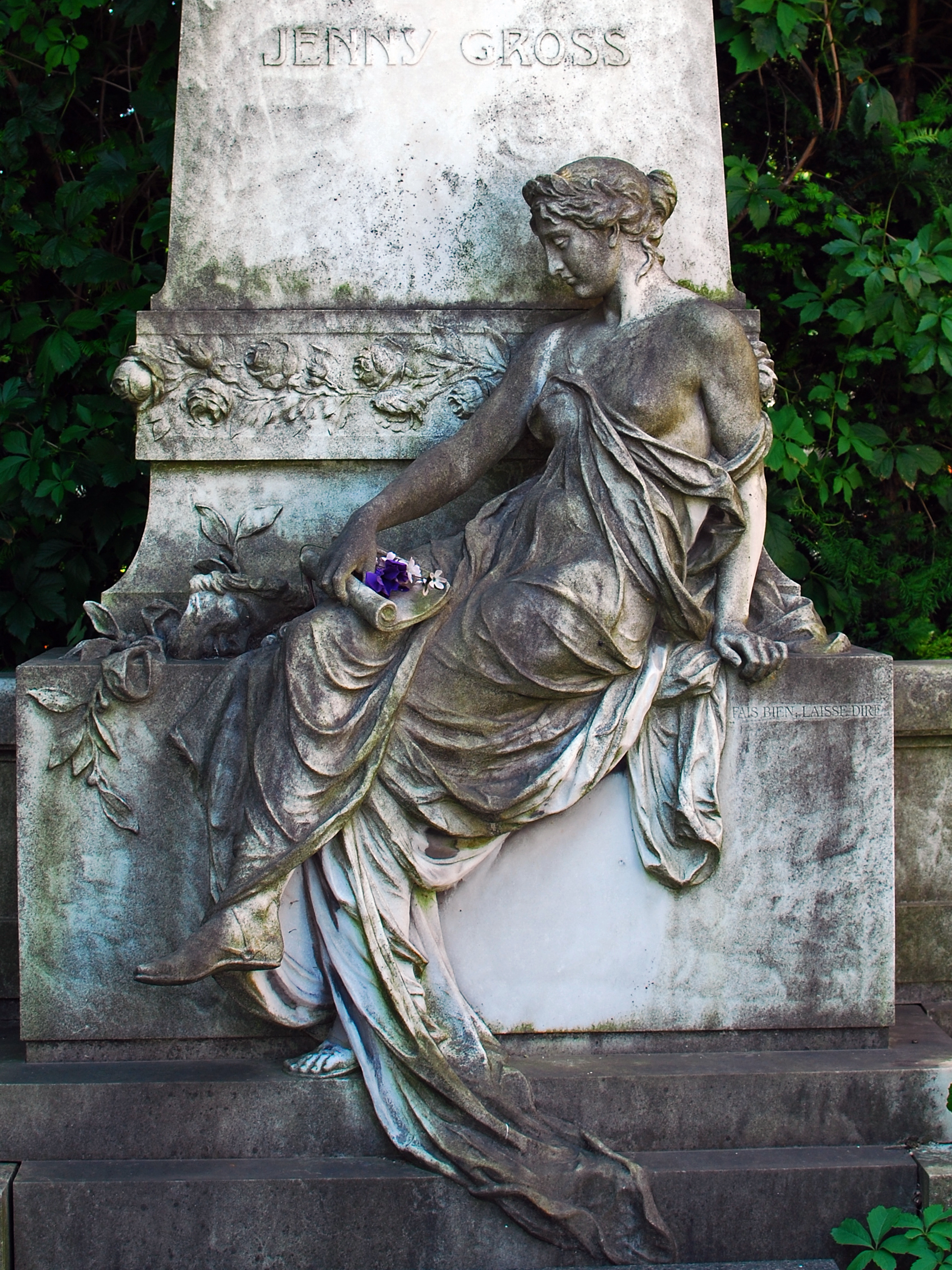 Grab Jenny Gross Kulturschaffende